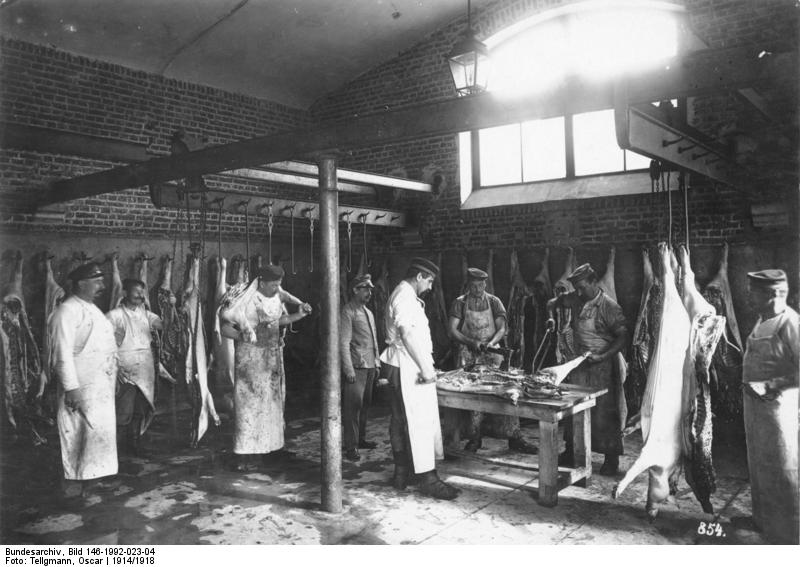 1. Weltkrieg 1914/18 Deutsche Militärmetzger in einem franz[ösischen] Schlachthaus